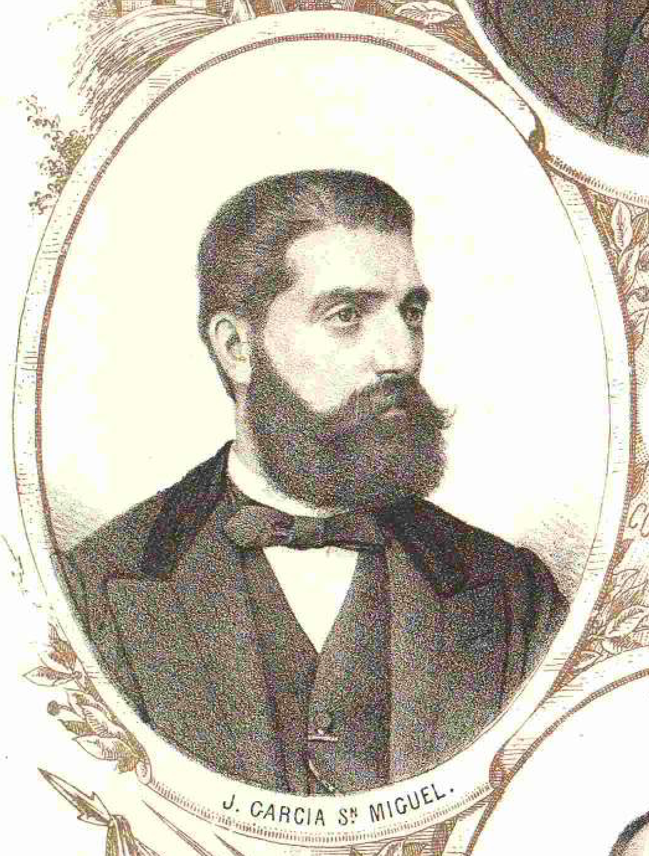 Lámina de Los diputados pintados por sus hechos.